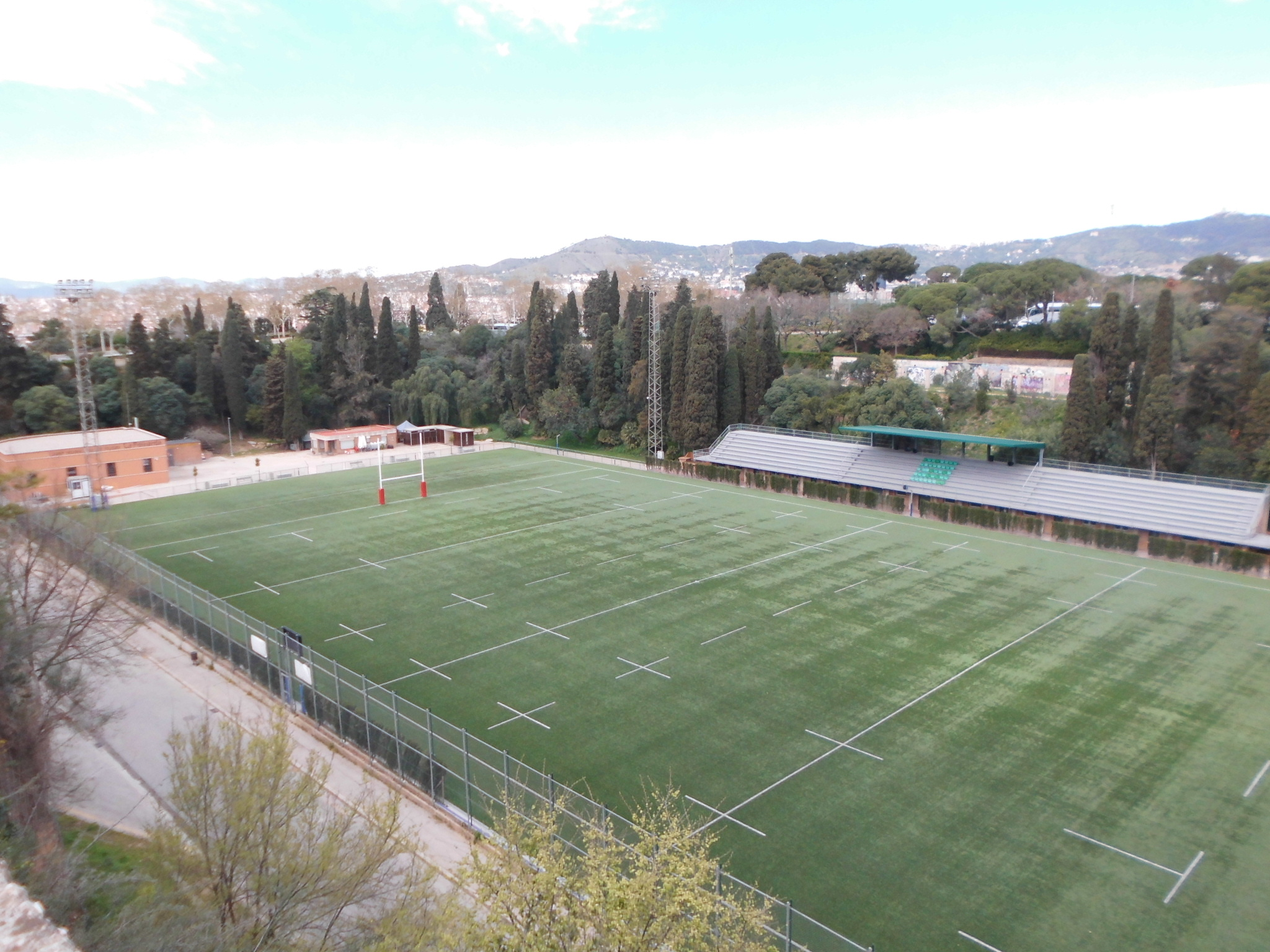 Camp Municipal de Rugbi La Foixarda